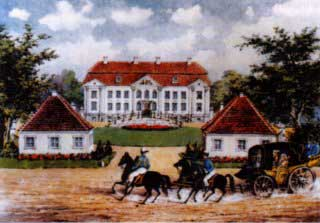 Schloss Waldburg-Capustigall, near Königsberg in Preußen (Kaliningrad)